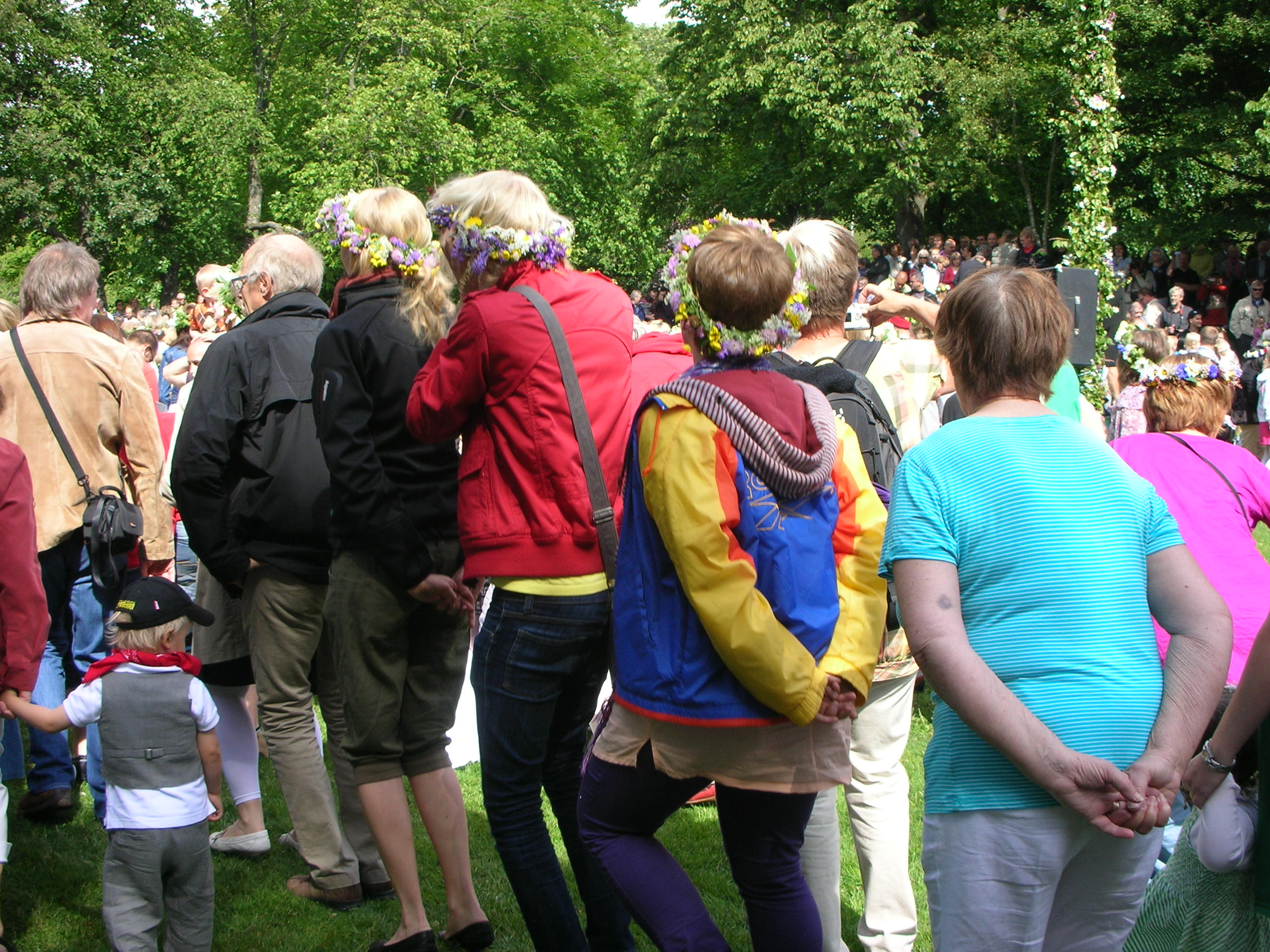 Folk som dansar Små grodorna vid midsommarfirande i Varberg 19 juni 2009.